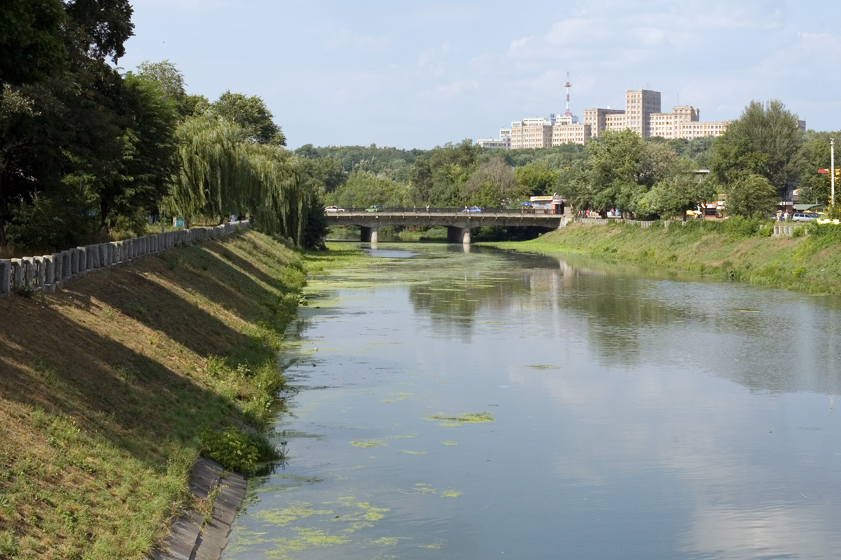 Lopan River and KhGU (Kharkov) Вид от Купеческого моста на Бурсацкий мост. Слева Суздальские ряды 19 века (не видны), справа новый супермаркет "Билла" (2000-е, не виден), вверху на горе Харьковский университет (1930-е)